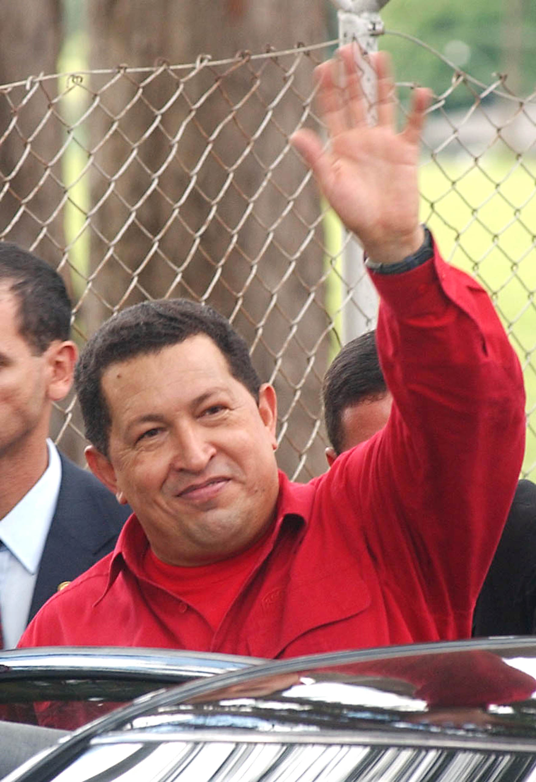 Brasília - Entrevista do presidente da Venezuela, Hugo Chávez, após reunião na Granja do Torto com os presidentes do Brasil, Luiz Inácio Lula da Silva, e da Argentina, Néstor Kirchner.